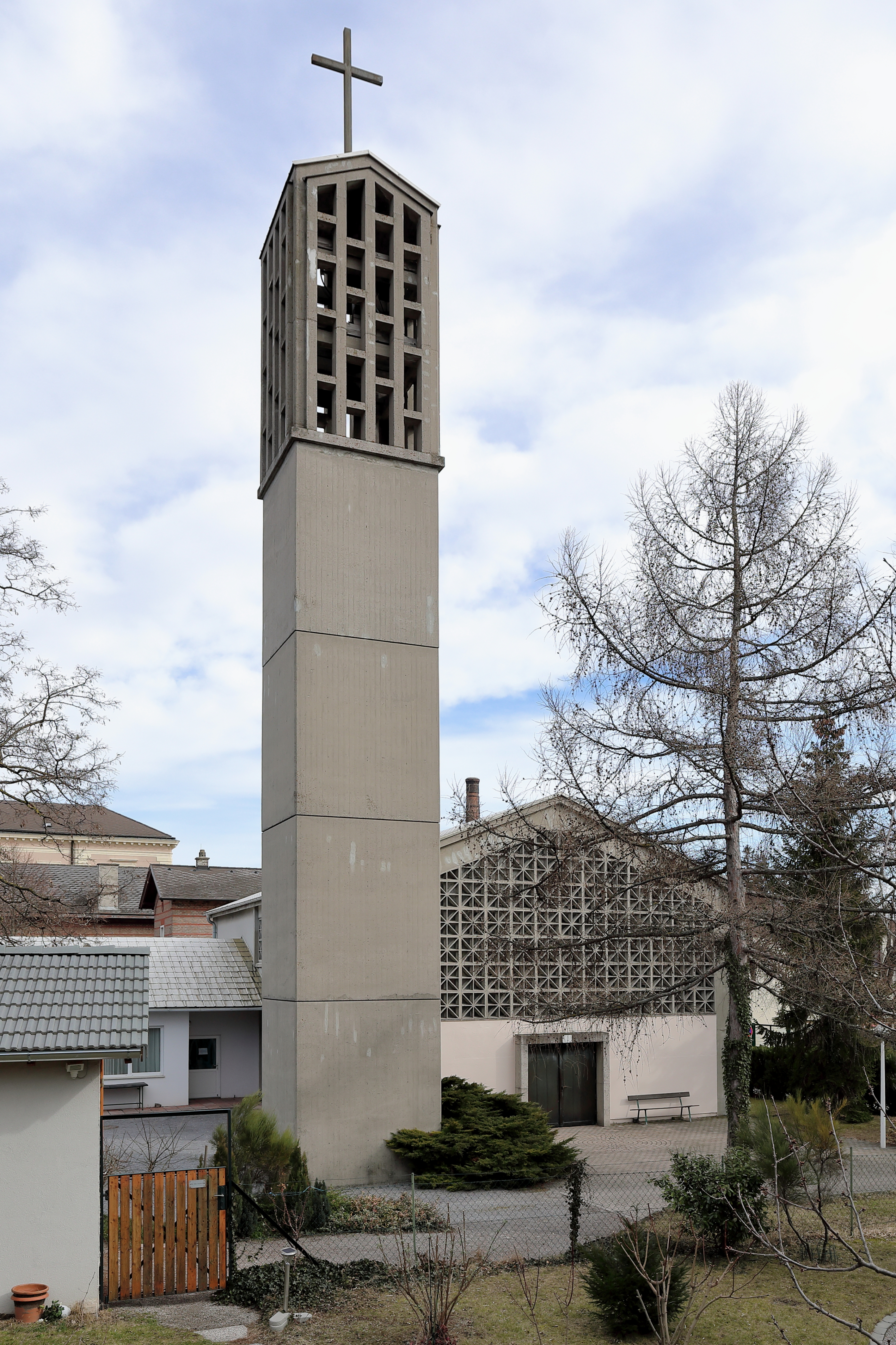 Westansicht der evangelische Christuskirche in der niederösterreichischen Stadtgemeinde Bad Vöslau. Der Kirchenbau als funktionalistischer Betonbau mit einem Turm wurde 1966 nach den Plänen des Architekten Herbert Fritscher-Notthaft erbaut.